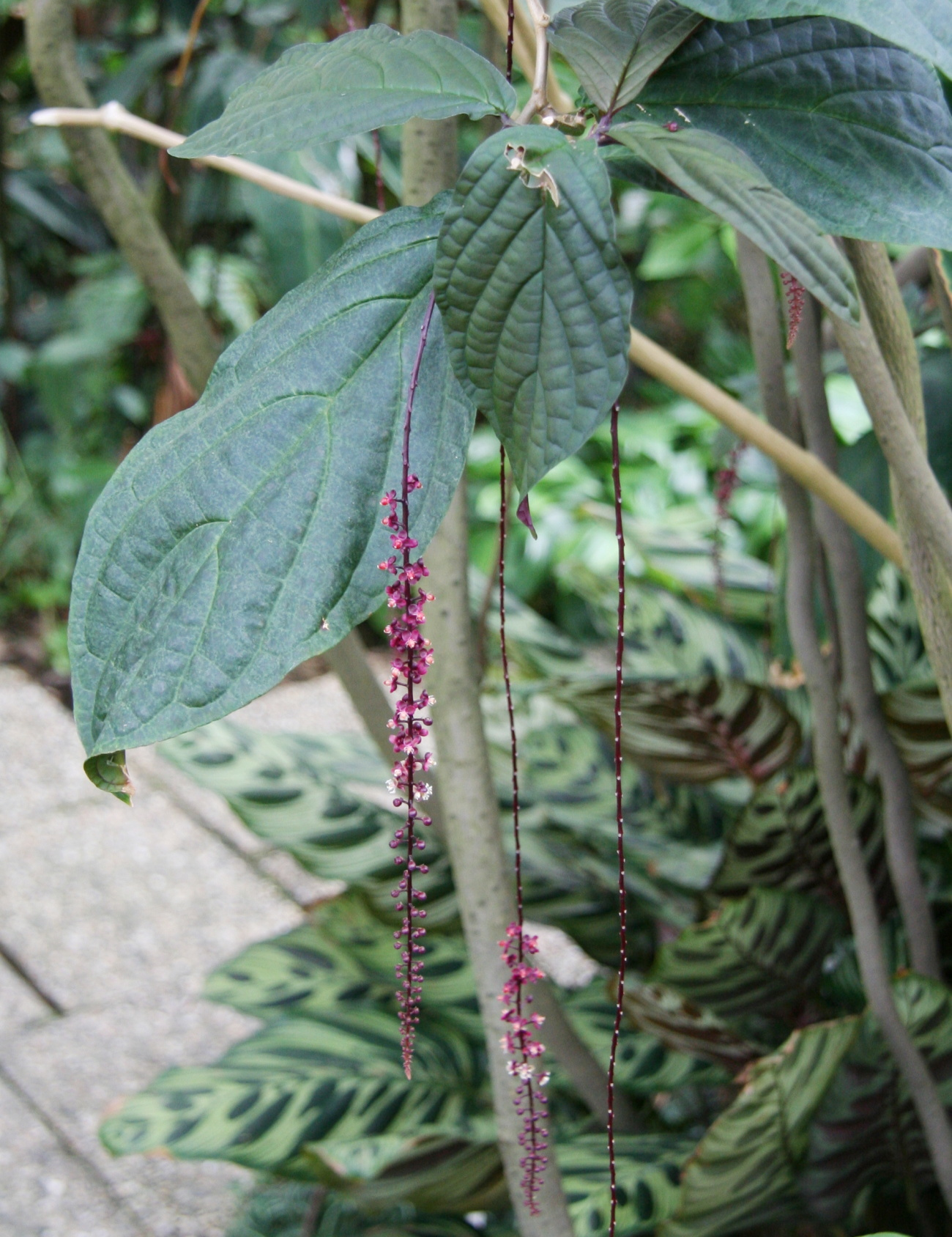 Trichostigma peruvianum im Botanischen Garten Dresden